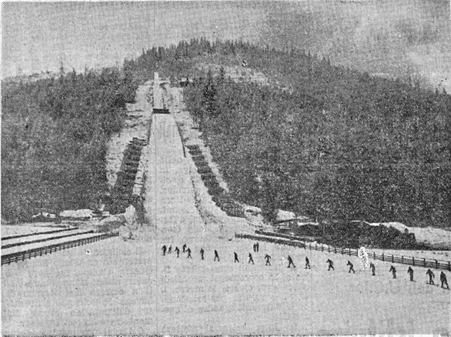 Il trampolino del salto con gli sci di Zakopane ai campionati mondiali di sci alpino del febbraio 1939.